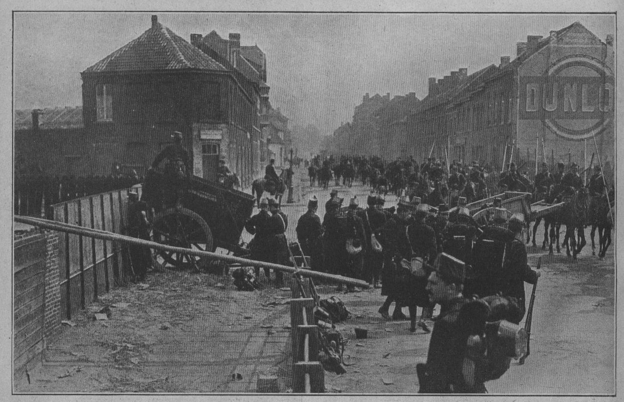 Lanciers belges traversant Louvain qui est alors vidée de ses habitants.